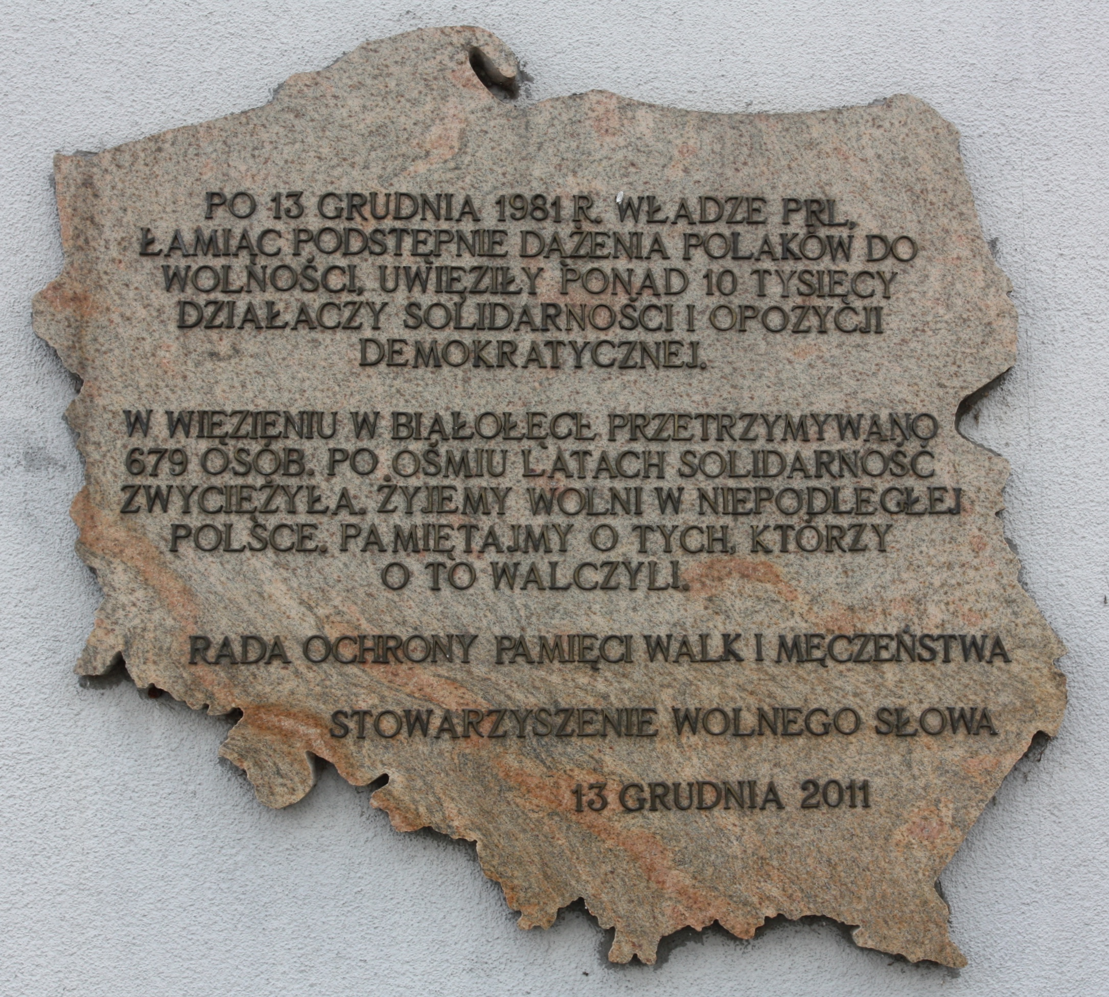 Tablica upamiętniająca internowanych w Areszcie na Białołęce umieszczona na murze Aresztu Śledczego Warszawa-Białołęka